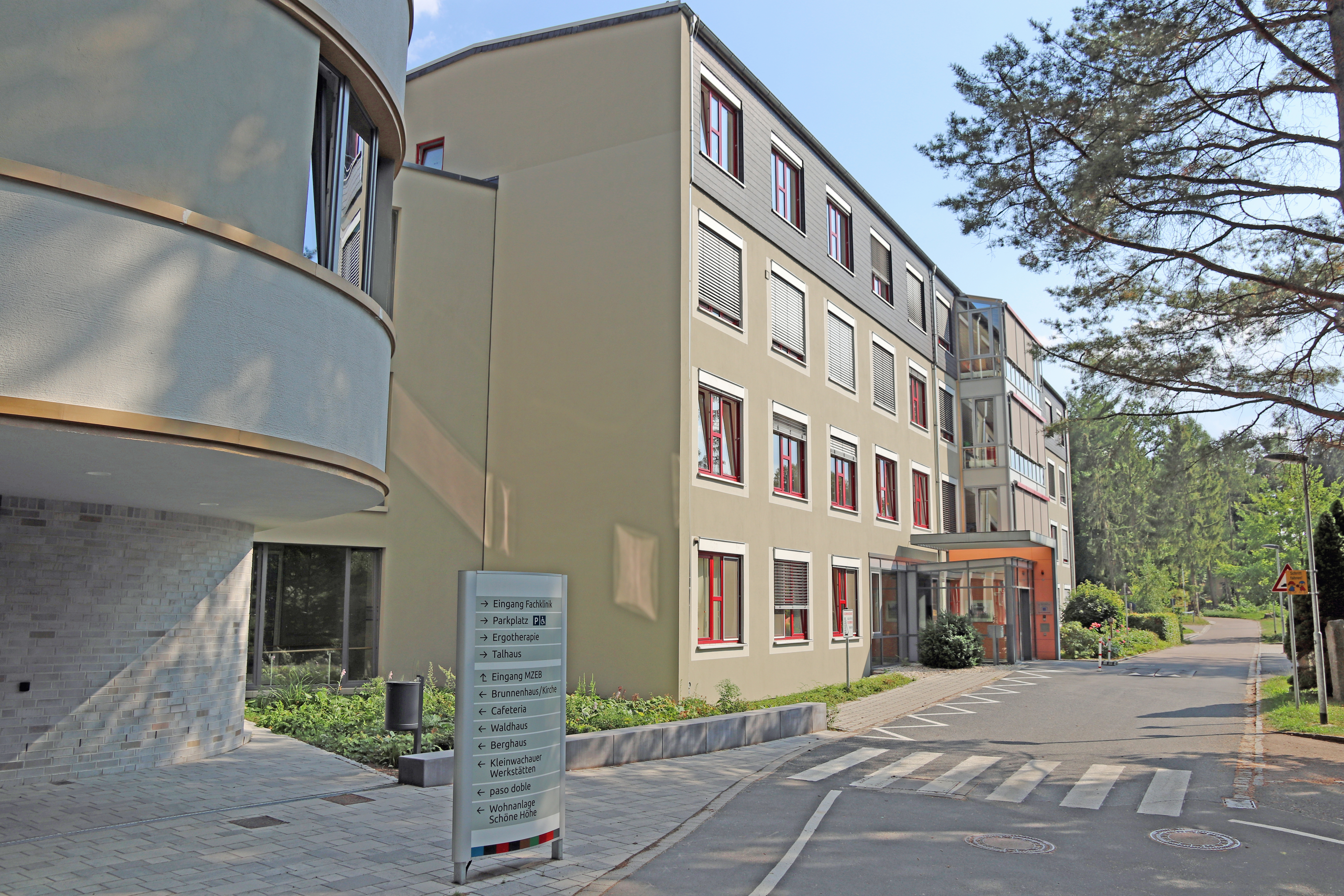 Fachlkrankenhaus für Neurologie in Kleinwachau bei Dresden (Sachsen)